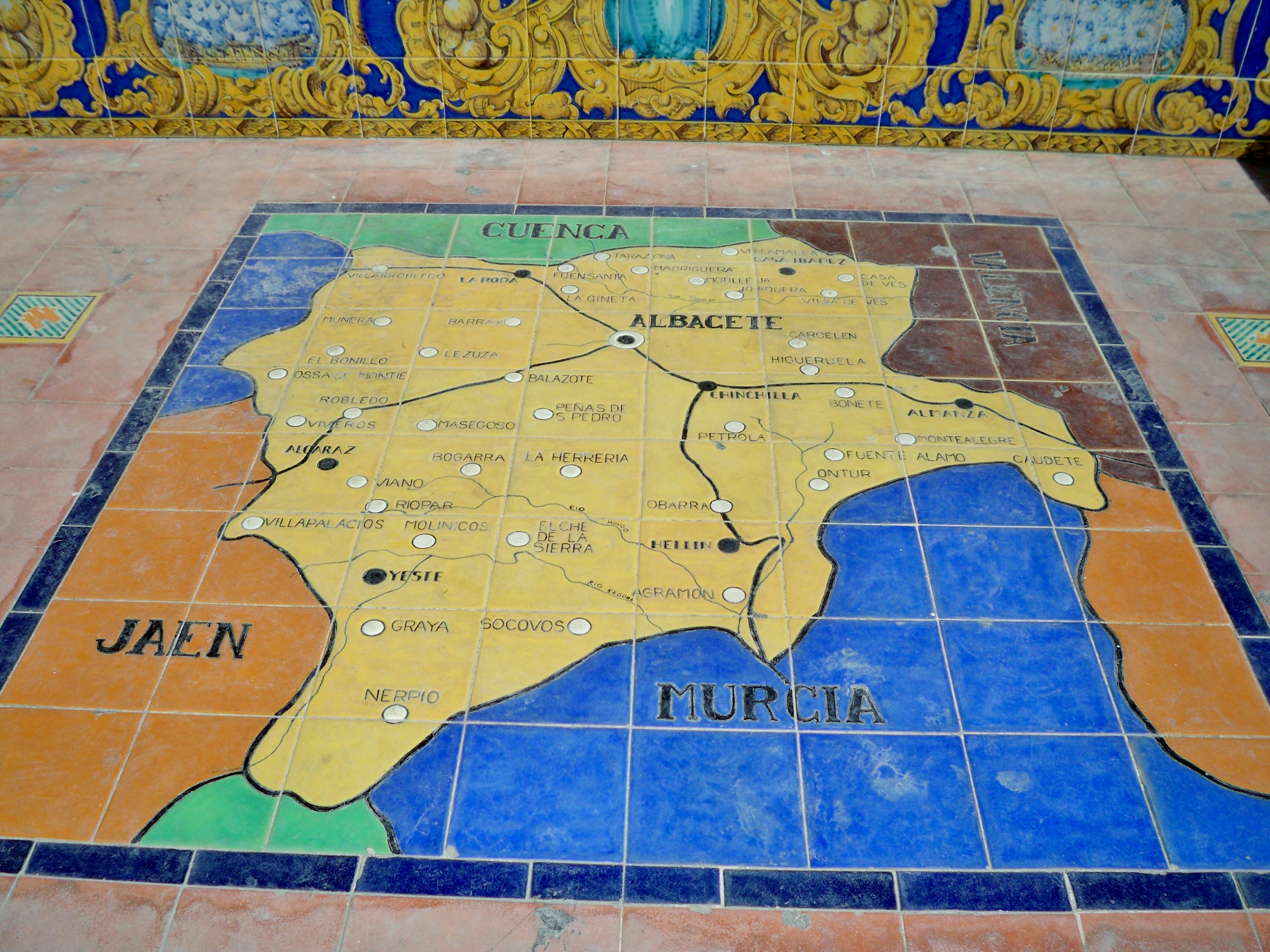 Mapa de la provincia de Albacete en la Plaza de España de Sevilla, inaugurada con motivo de la Exposición Iberoamericana de 1929